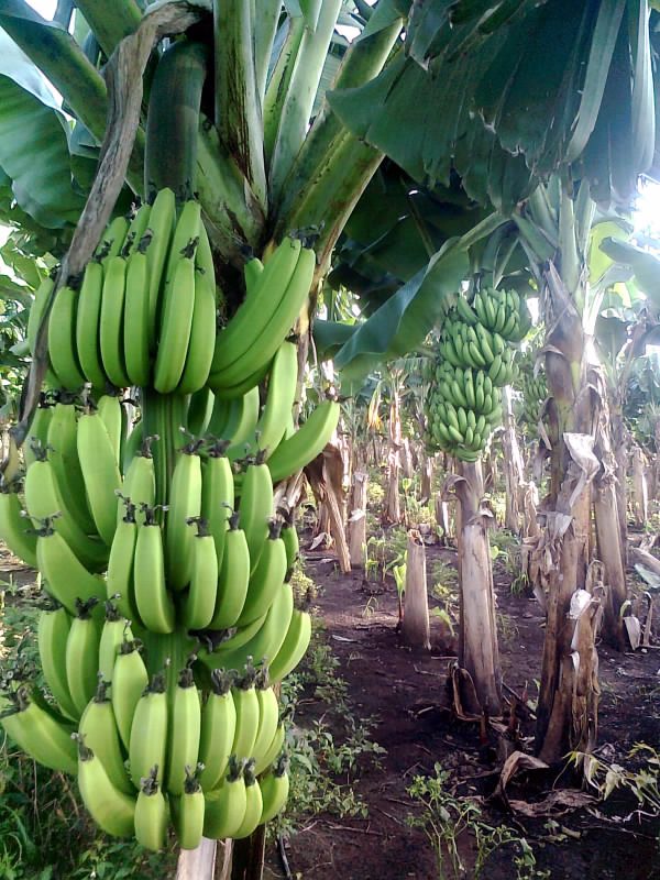 Banana farm, Chinawal village, Maharashtra, India